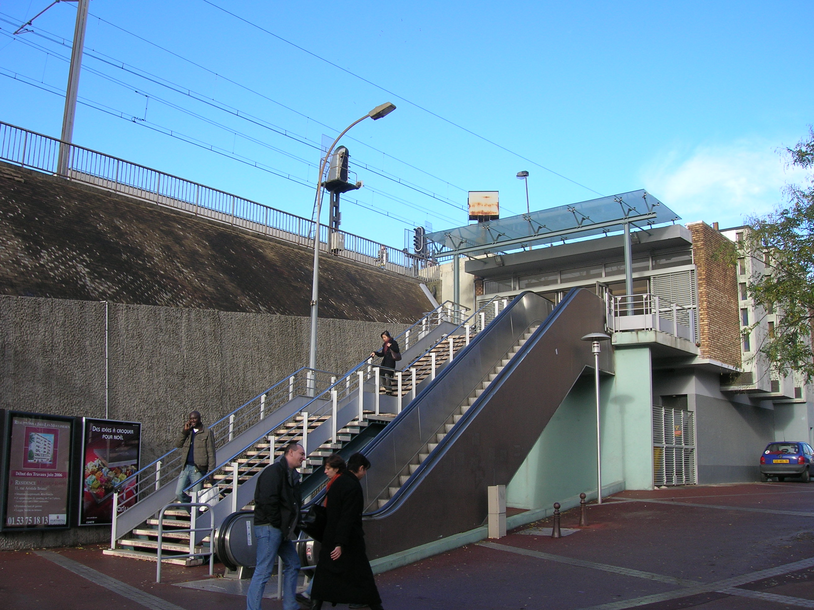 Gare d'Issy - Val de Seine, Île-de-France